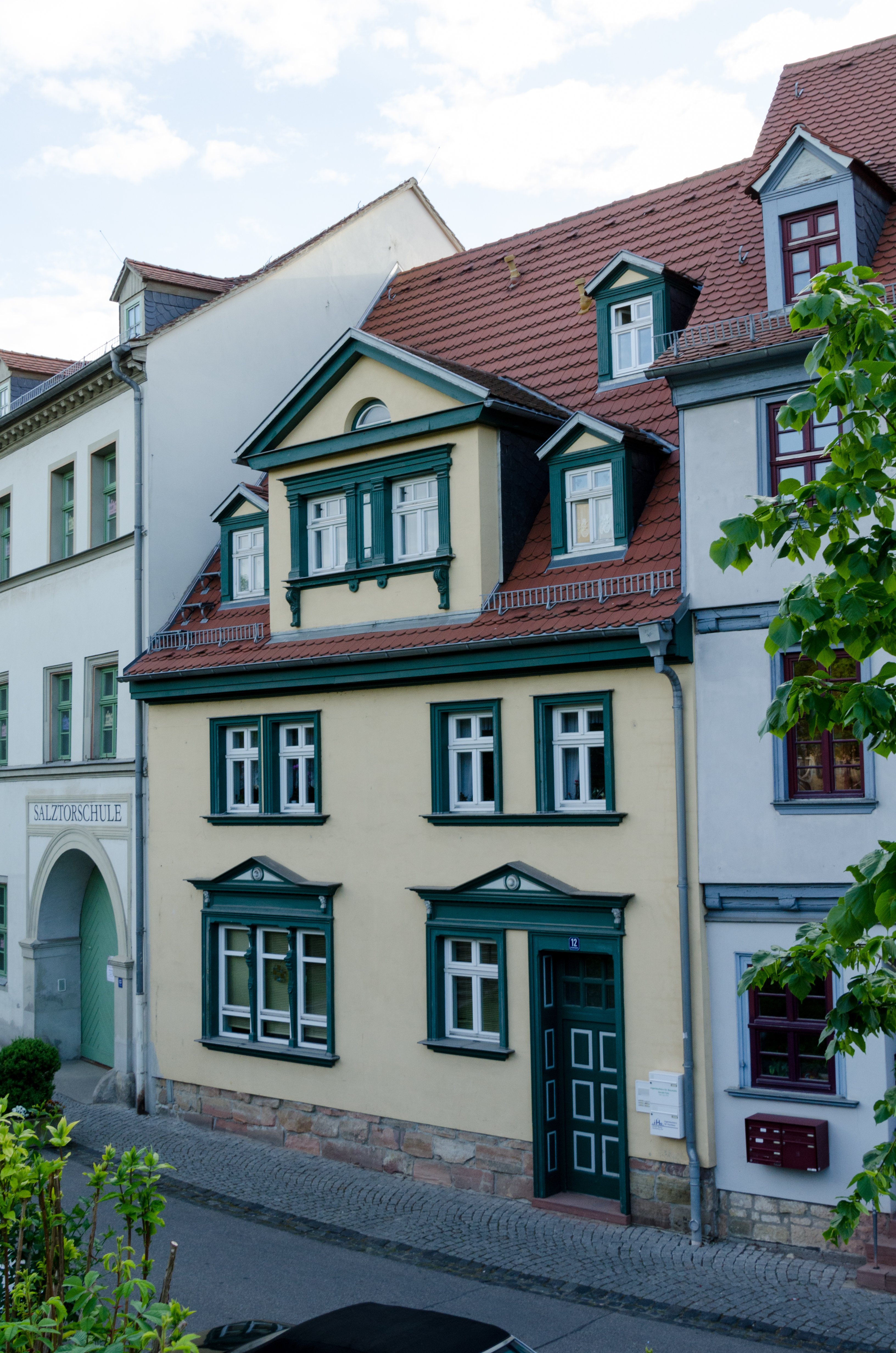 Naumburg, Kramerplatz 12